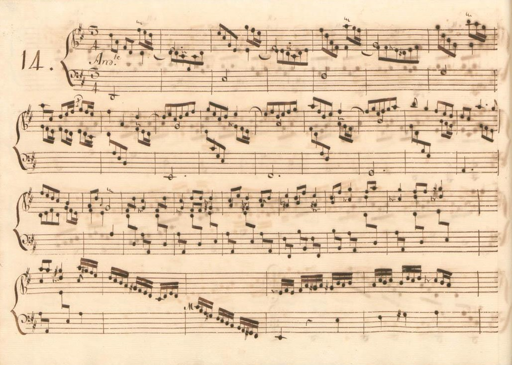 La sonate K. 258, telle qu'elle se présente dans le manuscrit de Parme, volume VI no. 14.